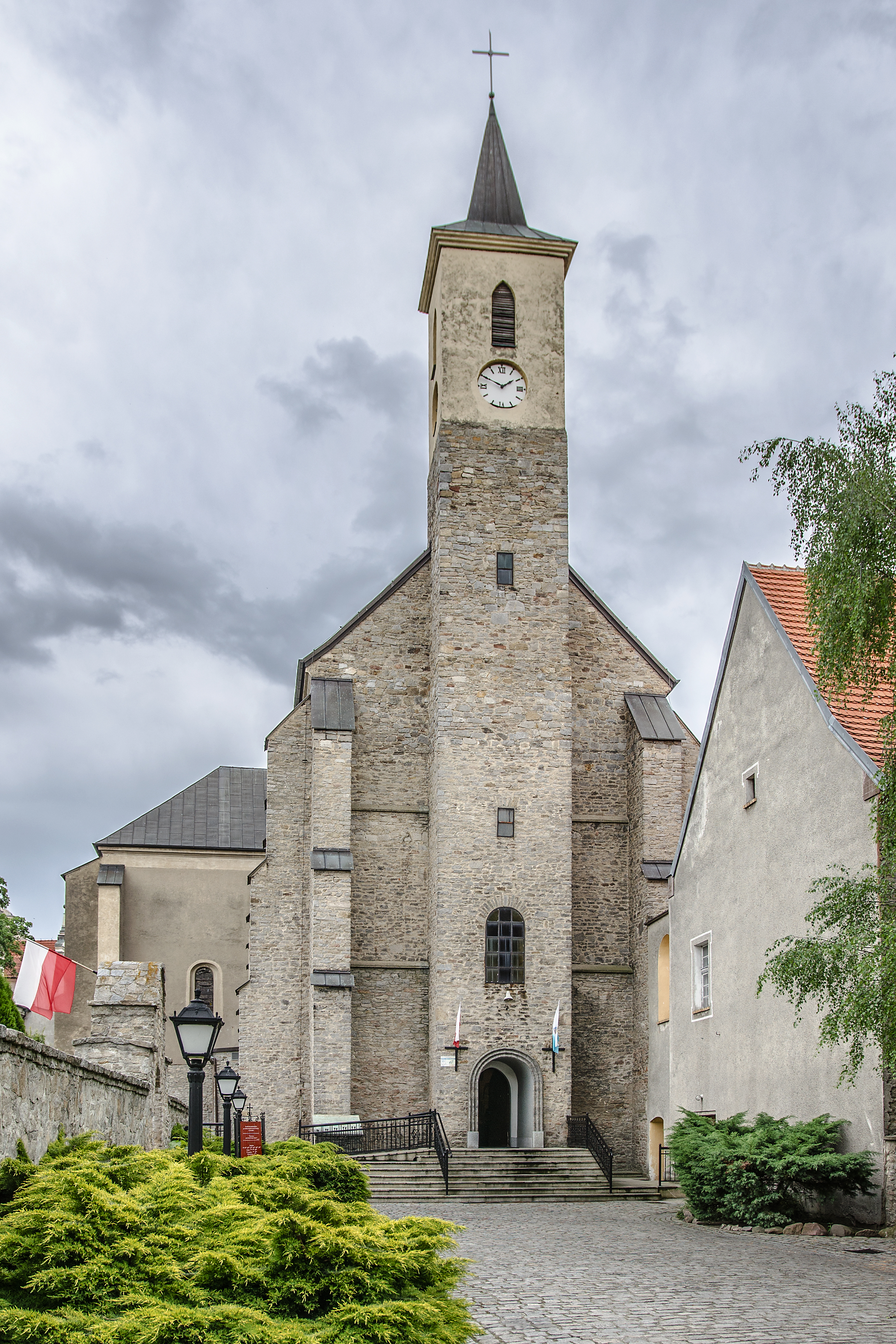 Strzelin, klasztor, XV, 1 poł. XVIII